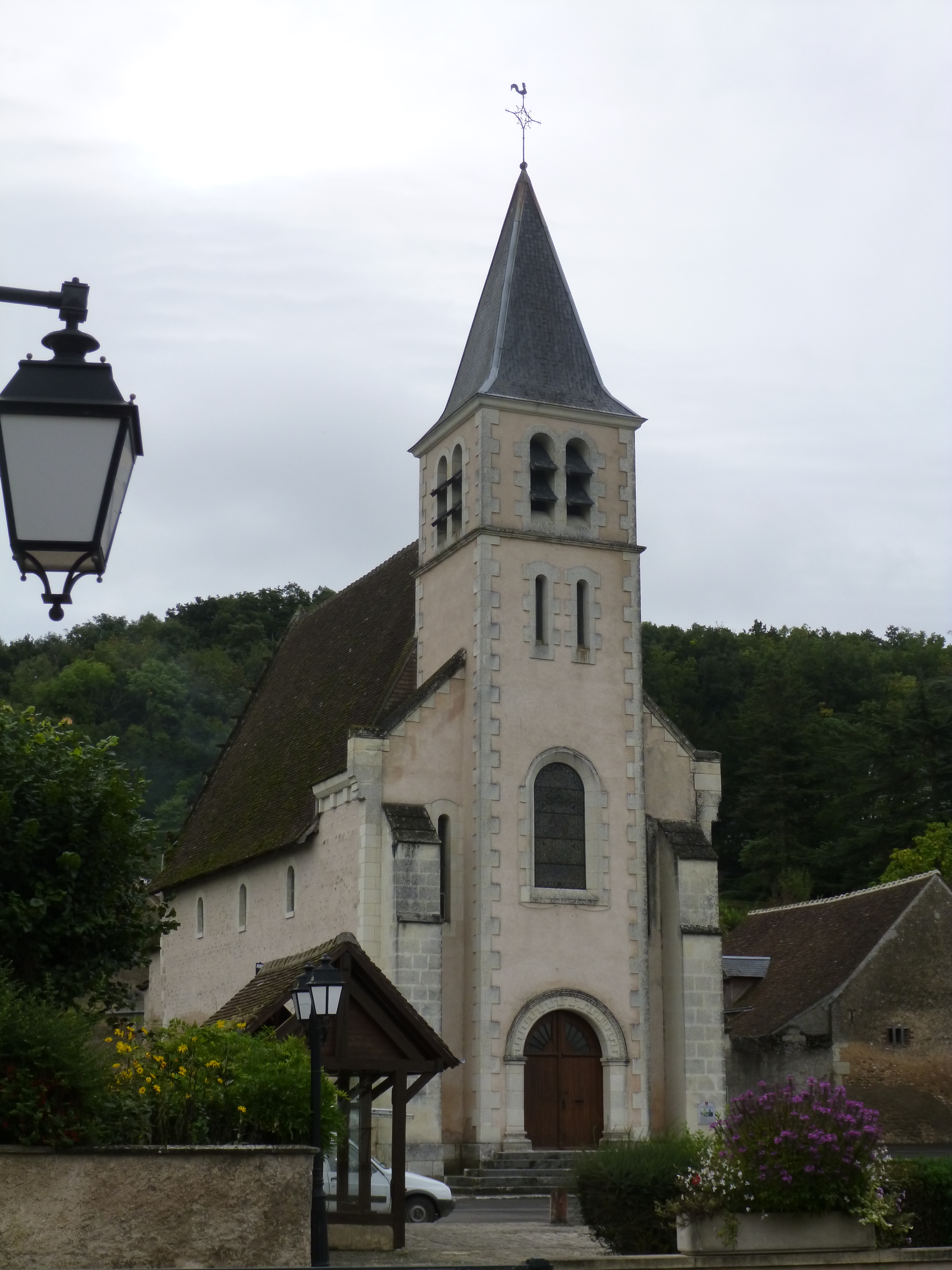 Église Notre Dame de Villavard